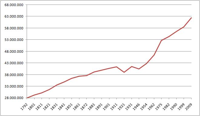 Crescita demografica della Francia 1792-2009